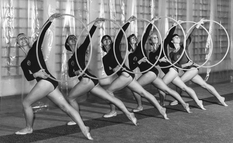 Zentralbild Studré 10.11.1967 Vorbereitung der Weltmeisterschaften in der Künstlerischen Gymnastik - Aufgebot der Deutschen Demokratischen Republik. Bei den Weltmeisterschaften in der Künstlerischen Gymnastik vom 18. bis 19.11.1967 in Kopenhagen wird erstmalig ein Weltmeistertitel in der Gruppengymnastik vergeben. Für die DDR starten vlnr Helga Wähner (16 Jahre - Jugendmeisterin von 1966 und 1967), Marlis Kunz (18 Jahre - beide HSG Wissenschaft DHfK Leipzig), Angelika Sohr (20 Jahre), Regina Streichmann (20 Jahre - beide SG Dynamo Hohenschönhausen), Christine Leubert (21 Jahre - HSG Wissenschaft DHfK Leipzig) und Rosemarie Halbritter (22 Jahre - HSG Wissenschaft PI Zwickau), die auch an den Einzelwettbewerben teilnimmt.